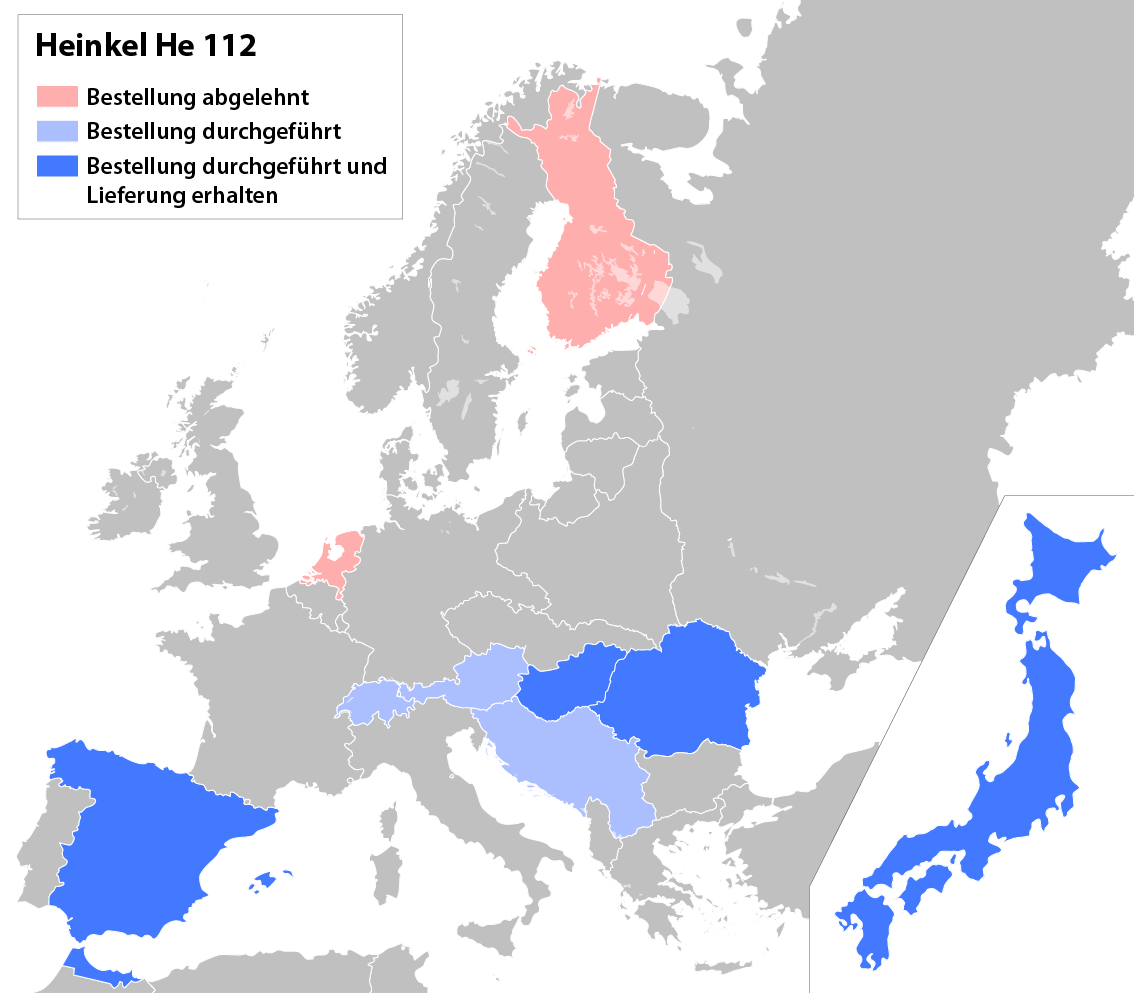 Karte der Bestellungen und Lieferungen der Heinkel He 112)